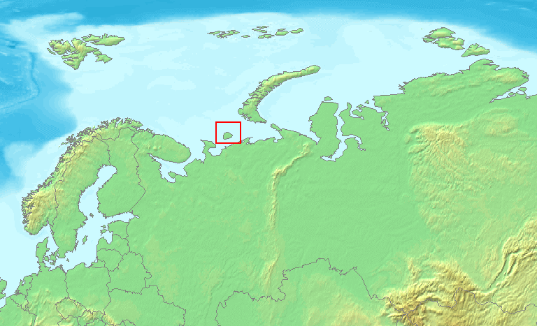 Kolgujew